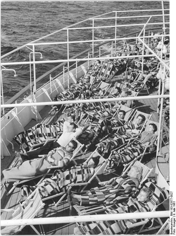 Zentralbild Krueger 9.5.1961 Erste Fahrt des FDGB-Urlauberschiffes "Fritz Heckert". Am 1. Mai 1961 ging das erste in der DDR gebaute Urlauberschiff "Fritz Heckert" von Wismar aus auf eine 12tägige Jungfernfahrt durch die Ostsee. UBz. Sonnenbad auf Deck.